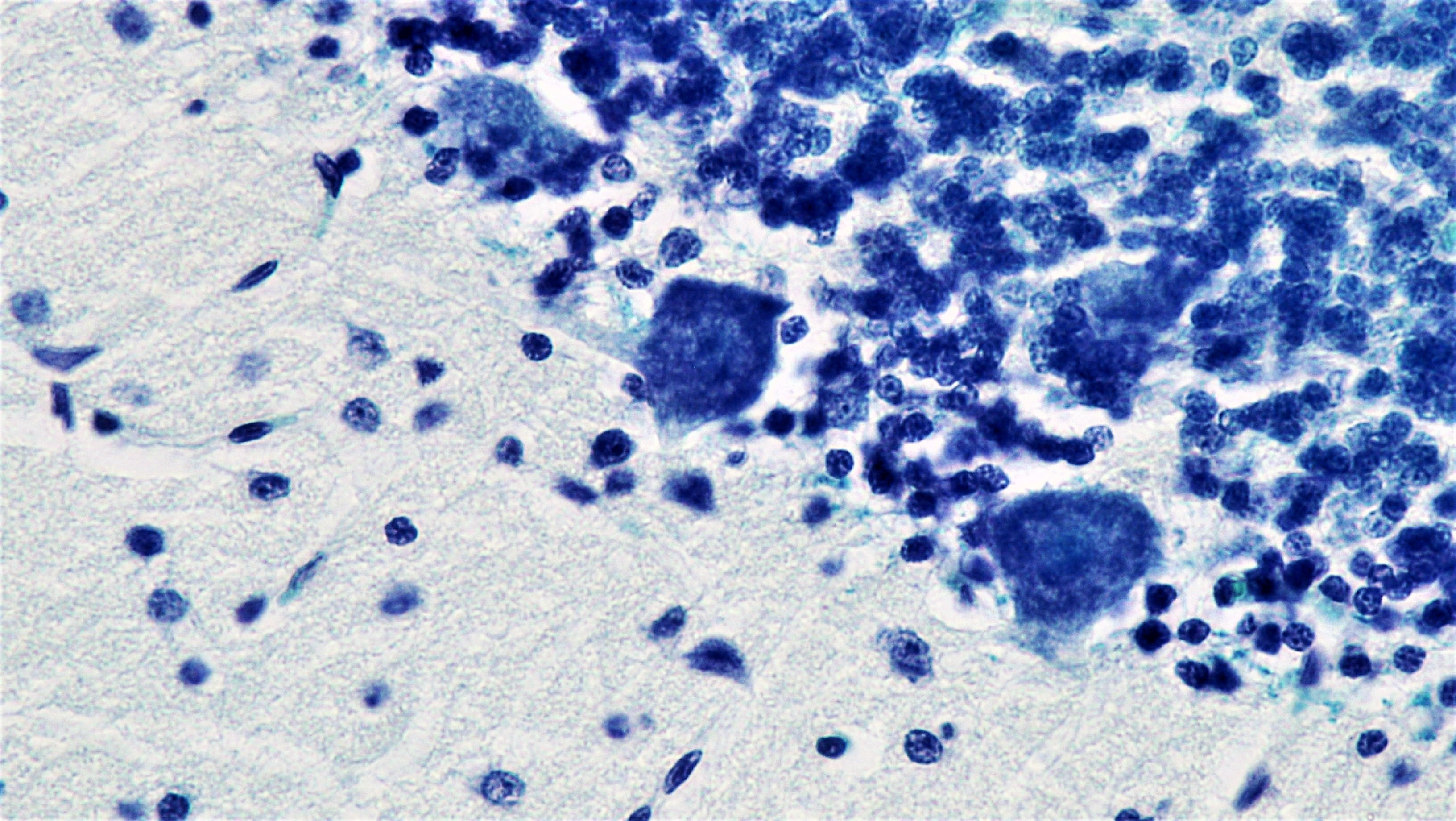 cross section: cerebellum magnification: 400x luxol fast blue/cresyl violet